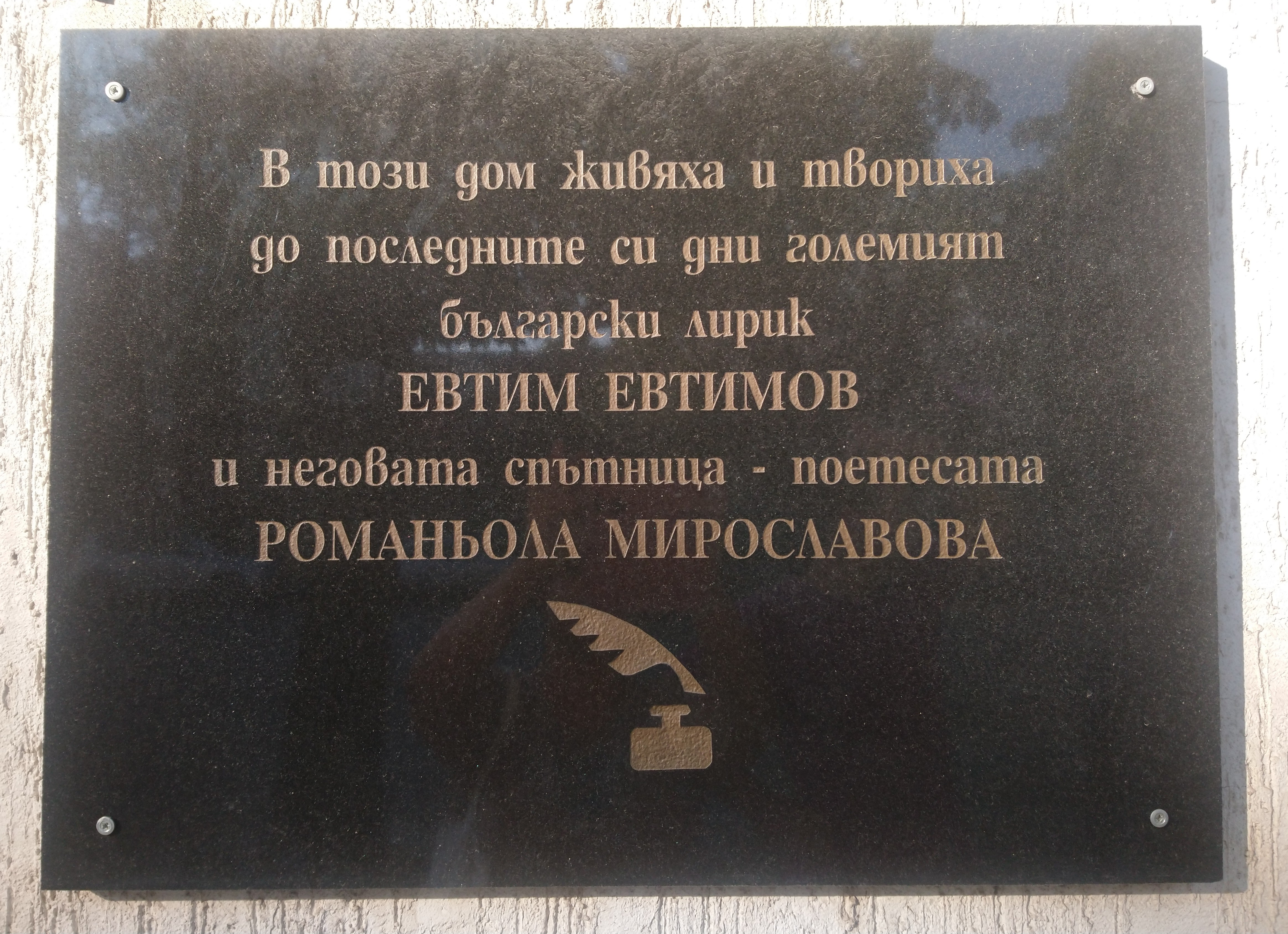 Паметна плоча на поета Евтим Евтимов и на поетесата Романьола Мирославова, София ул. „Дукатска планина“ № 21А